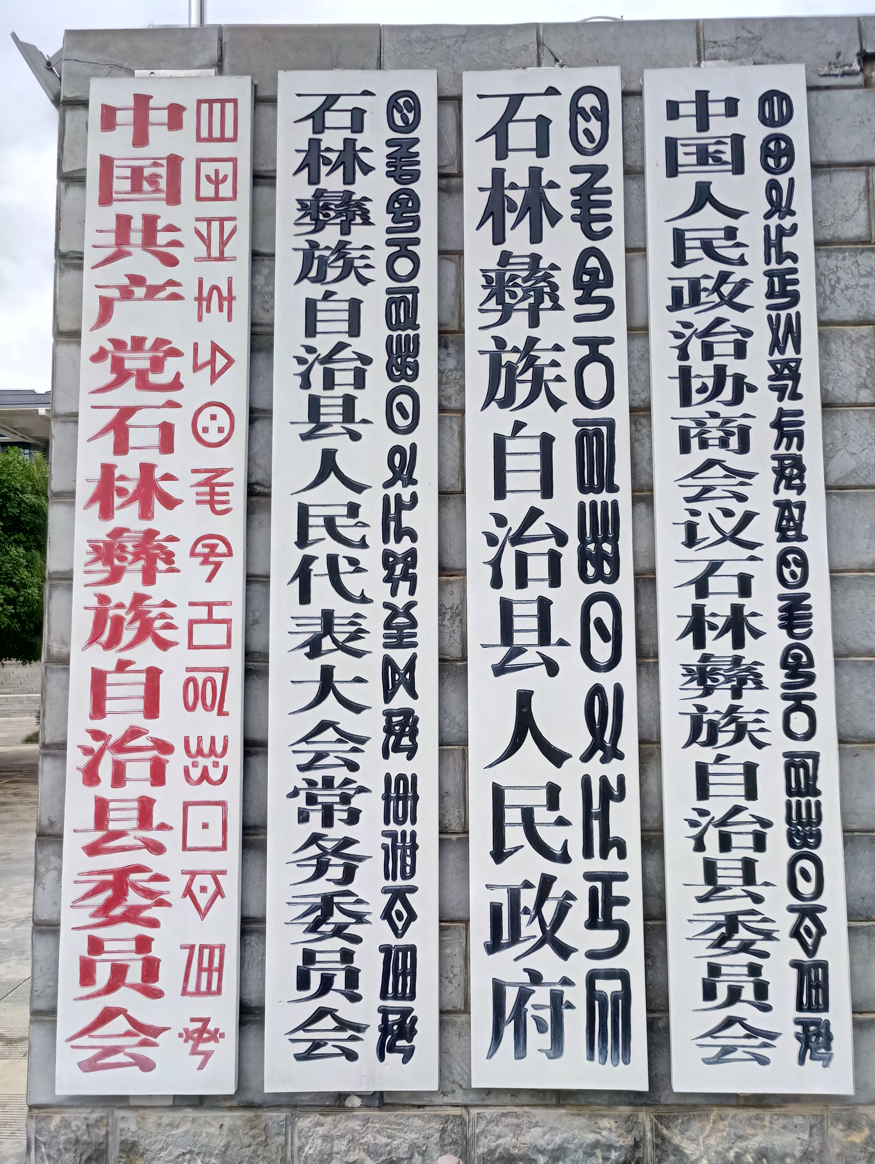 中文（中国大陆）: 石林彝族自治县政府门牌